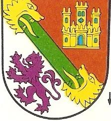 Escudo de armas del infante Juan de Castilla, hijo del rey Pedro I de Castilla.